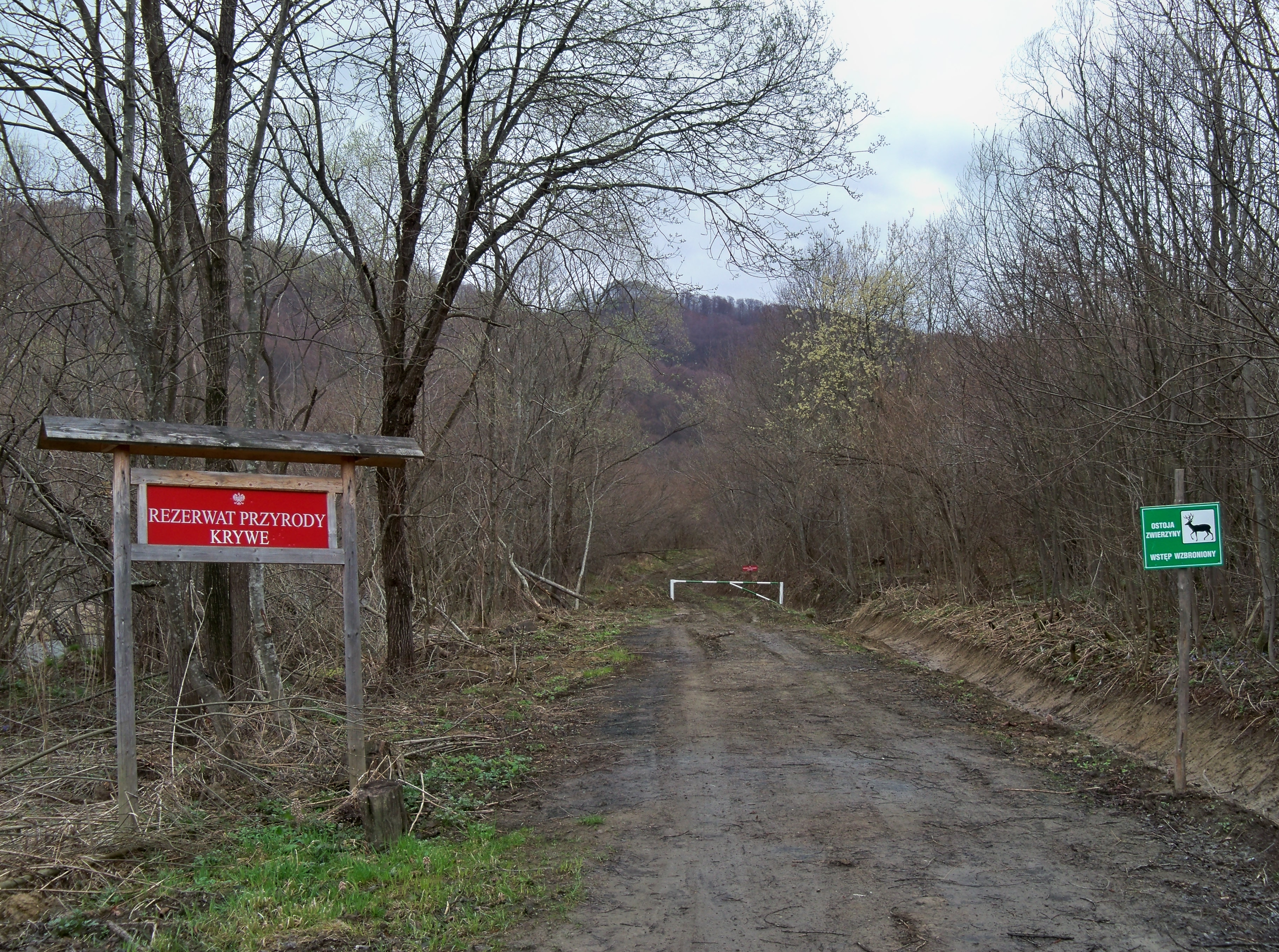 Tablica na północno-zachodnim wjeździe do rezerwatu Krywe w Bieszczadach